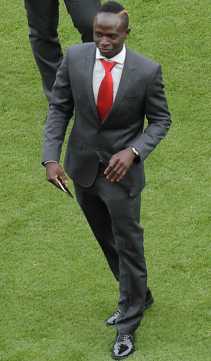 Sadio Mane